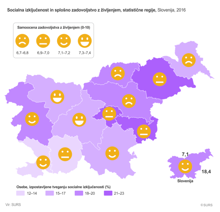 Socialna izključenost in splošno zadovoljstvo z življenjem, statistične regije, 2016